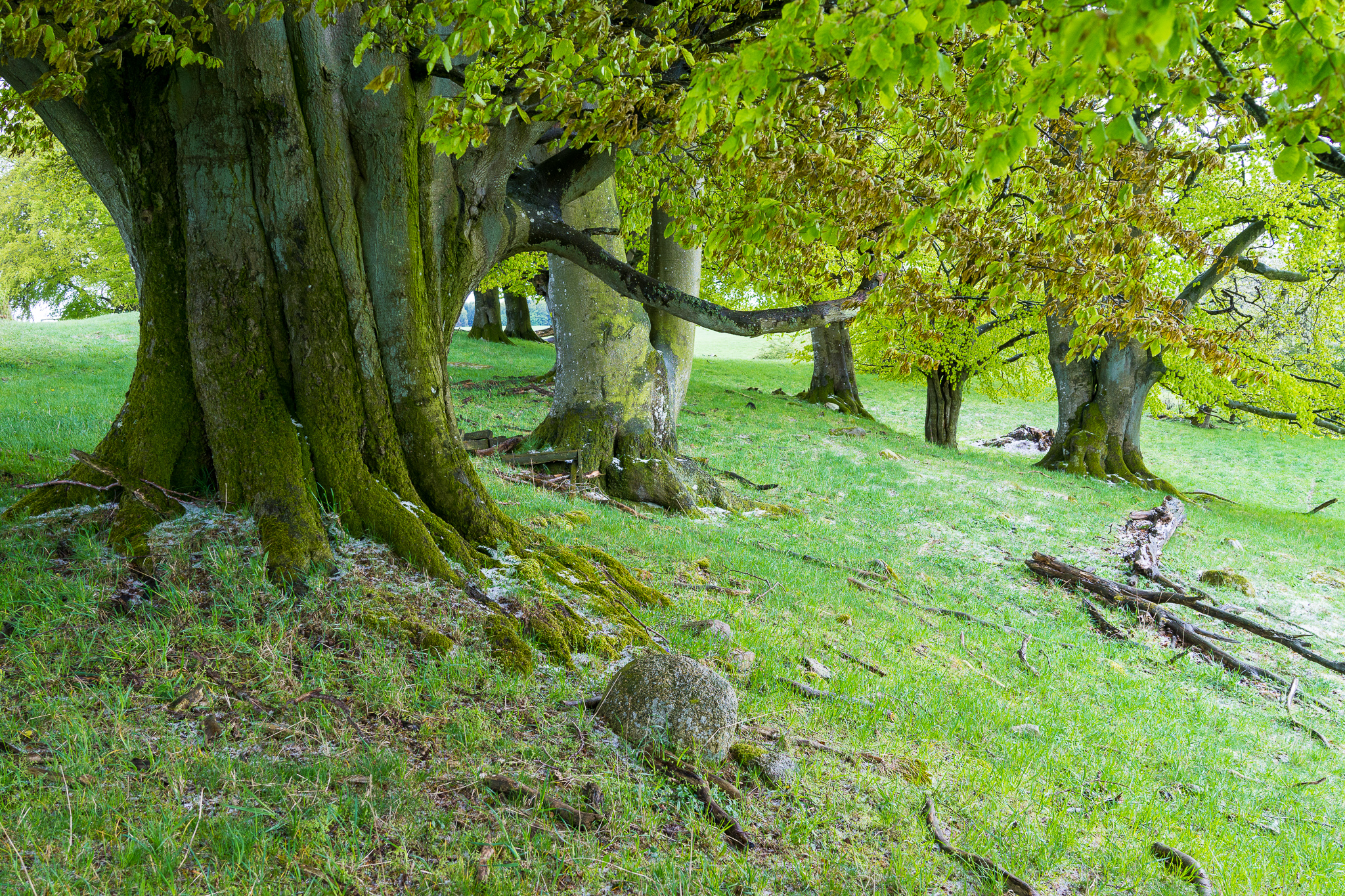 Alte Buchen im Ållskog naturreservat